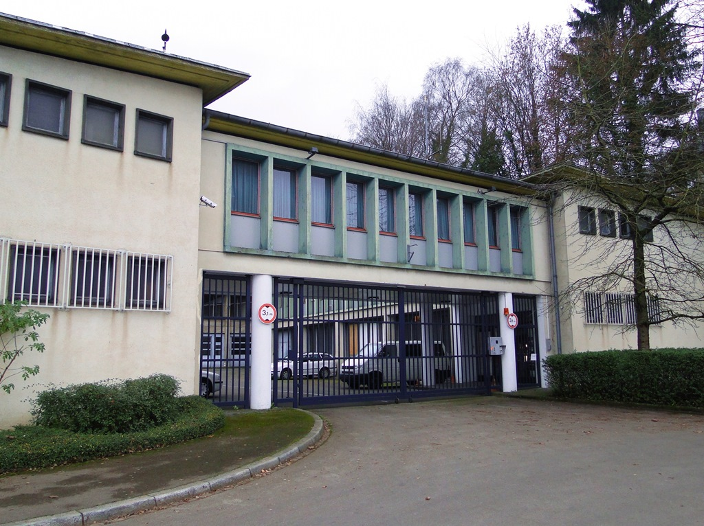 Luxembourg-Verlorenkost, bâtiments de l'ancienne Gendarmerie, aujourd'hui Police Grand-Ducale